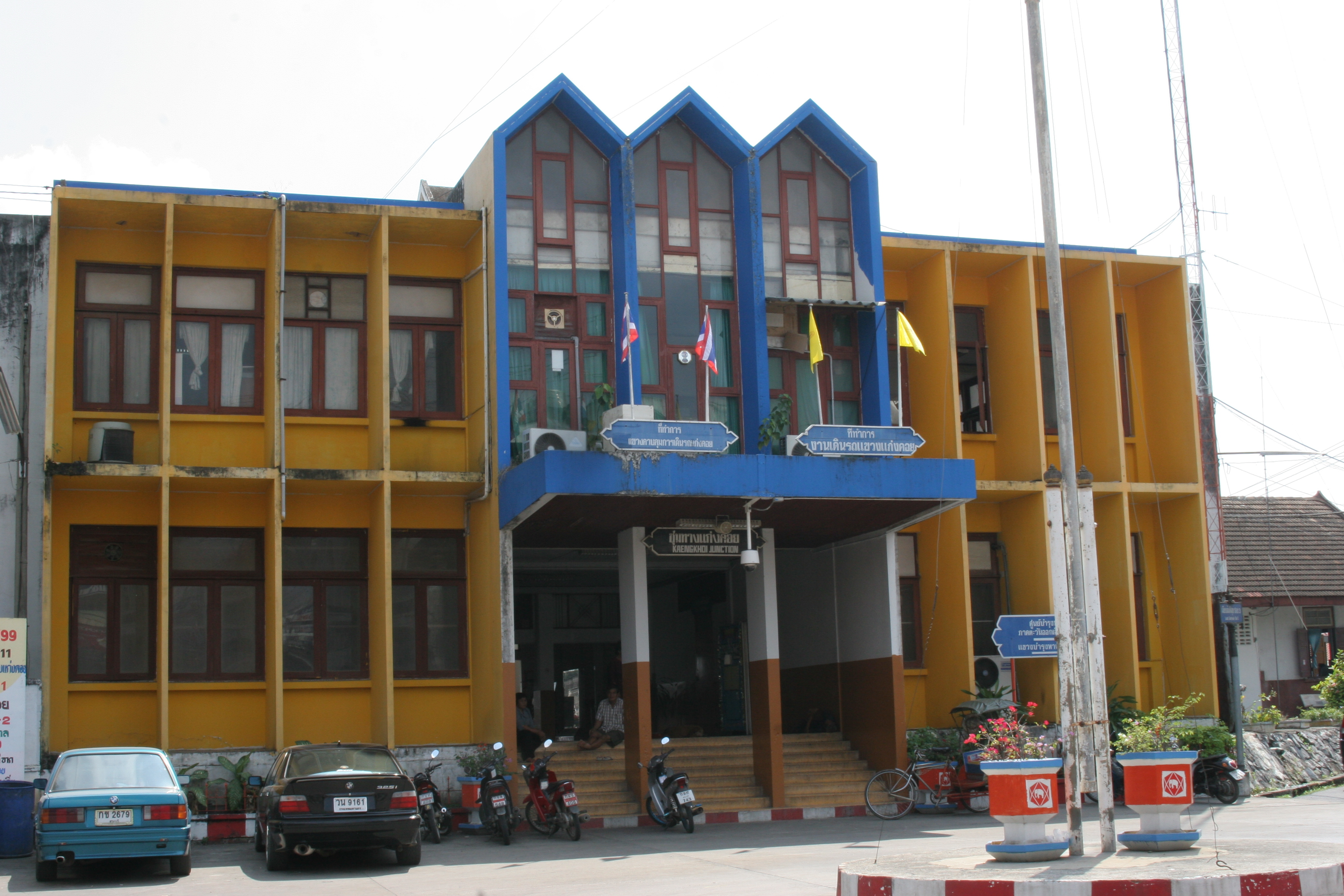 ケンコーイ駅